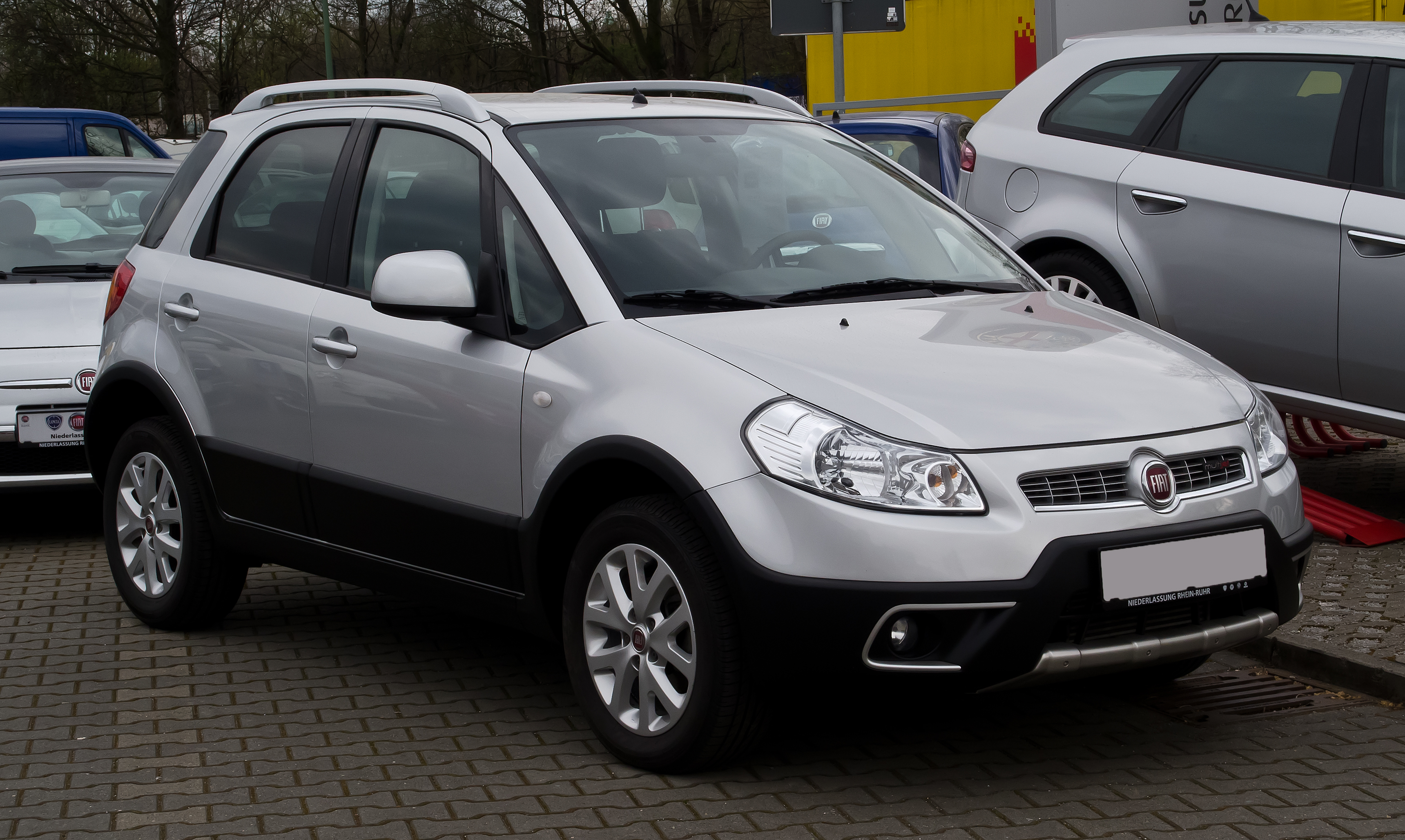 Fiat Sedici 2.0 16V Multijet Luxury (1. Facelift)